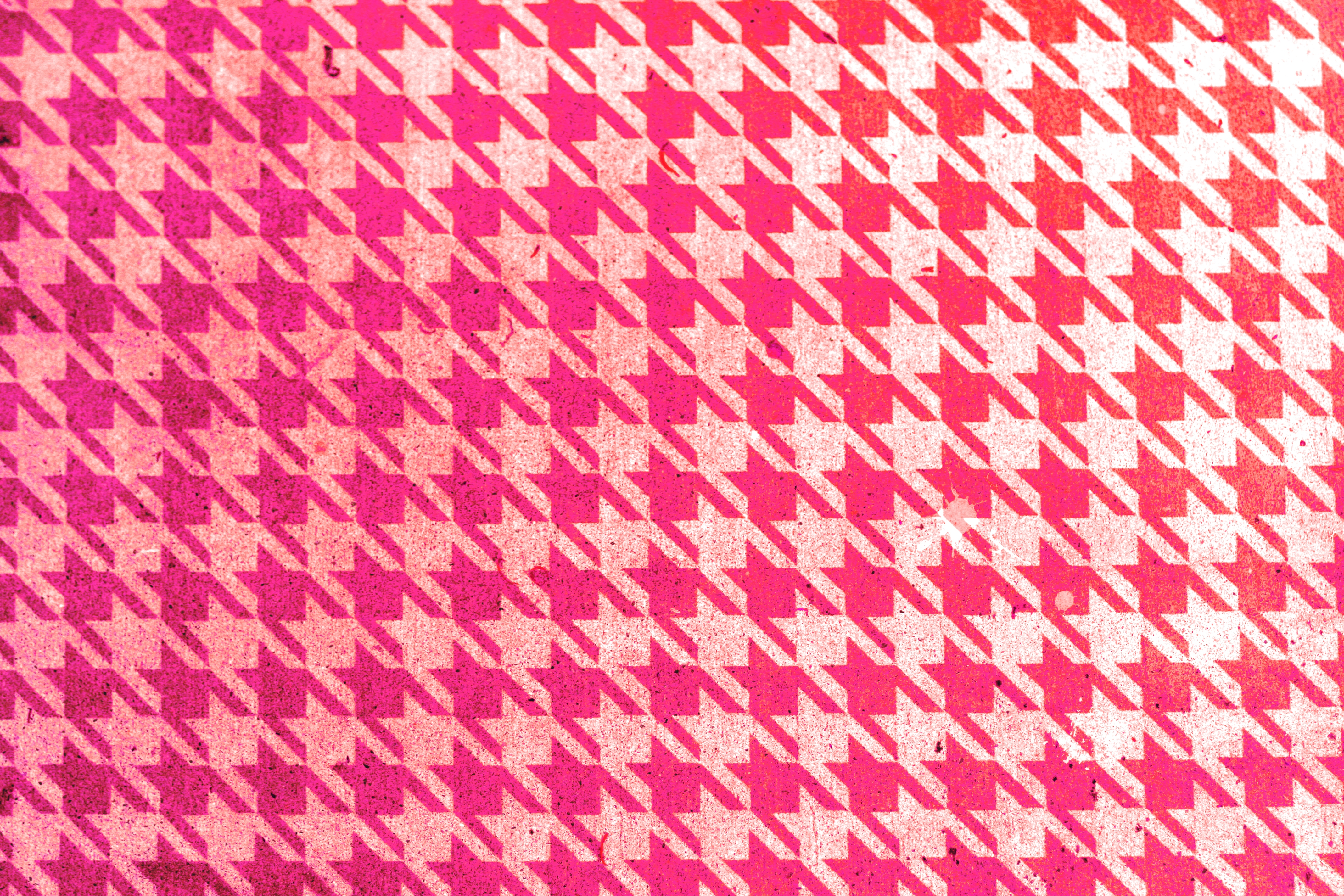 Free!!